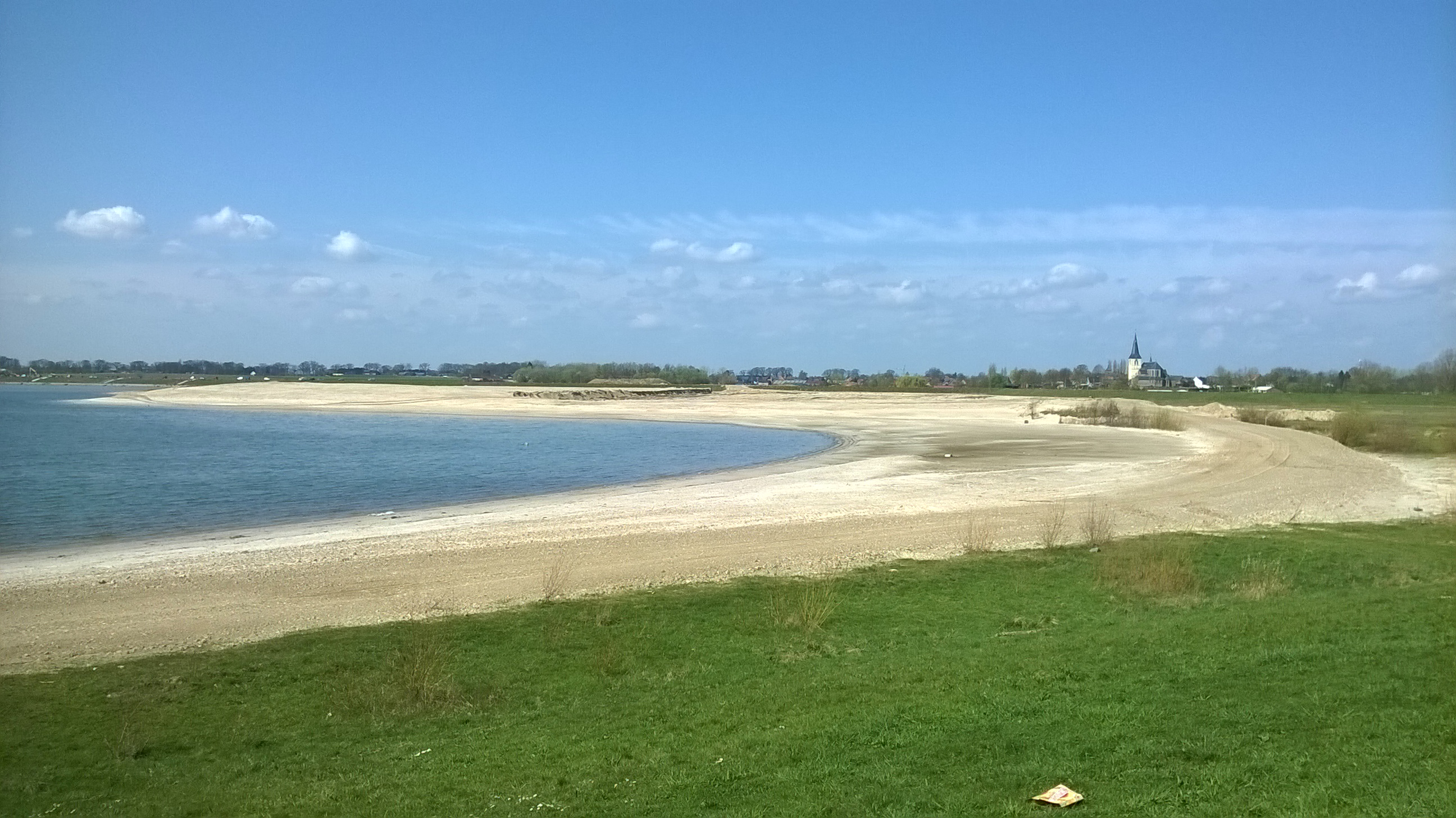 De Maasplas "Boterakker" in 2016. Rechts zien we de St.-Martinuskerk van Kessenich. Op de voor- en achtergrond zien we het gebied dat men door middel van opspuiting gedempt heeft. Later dat jaar vatten de herinrichtingswerken aan.